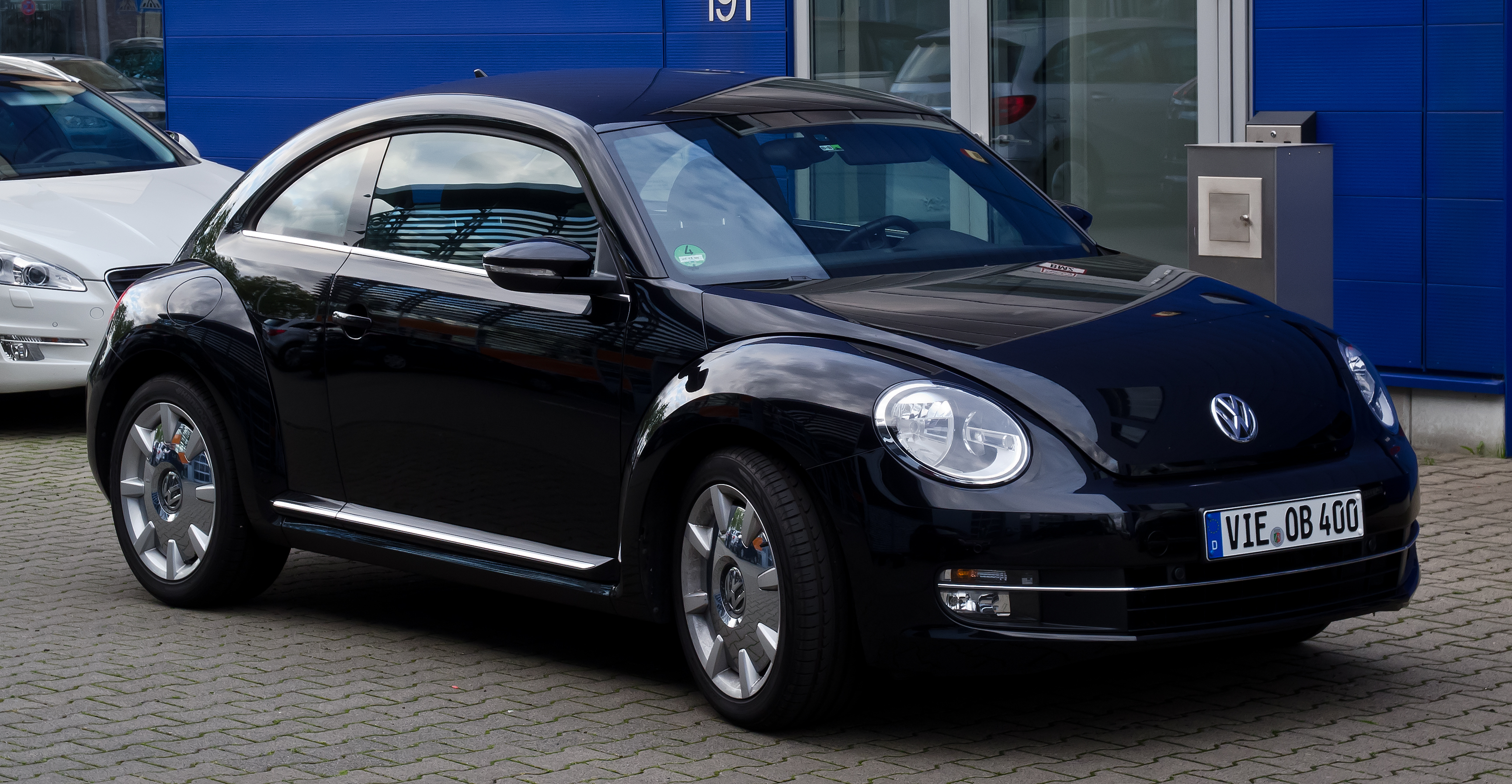 VW Beetle Design